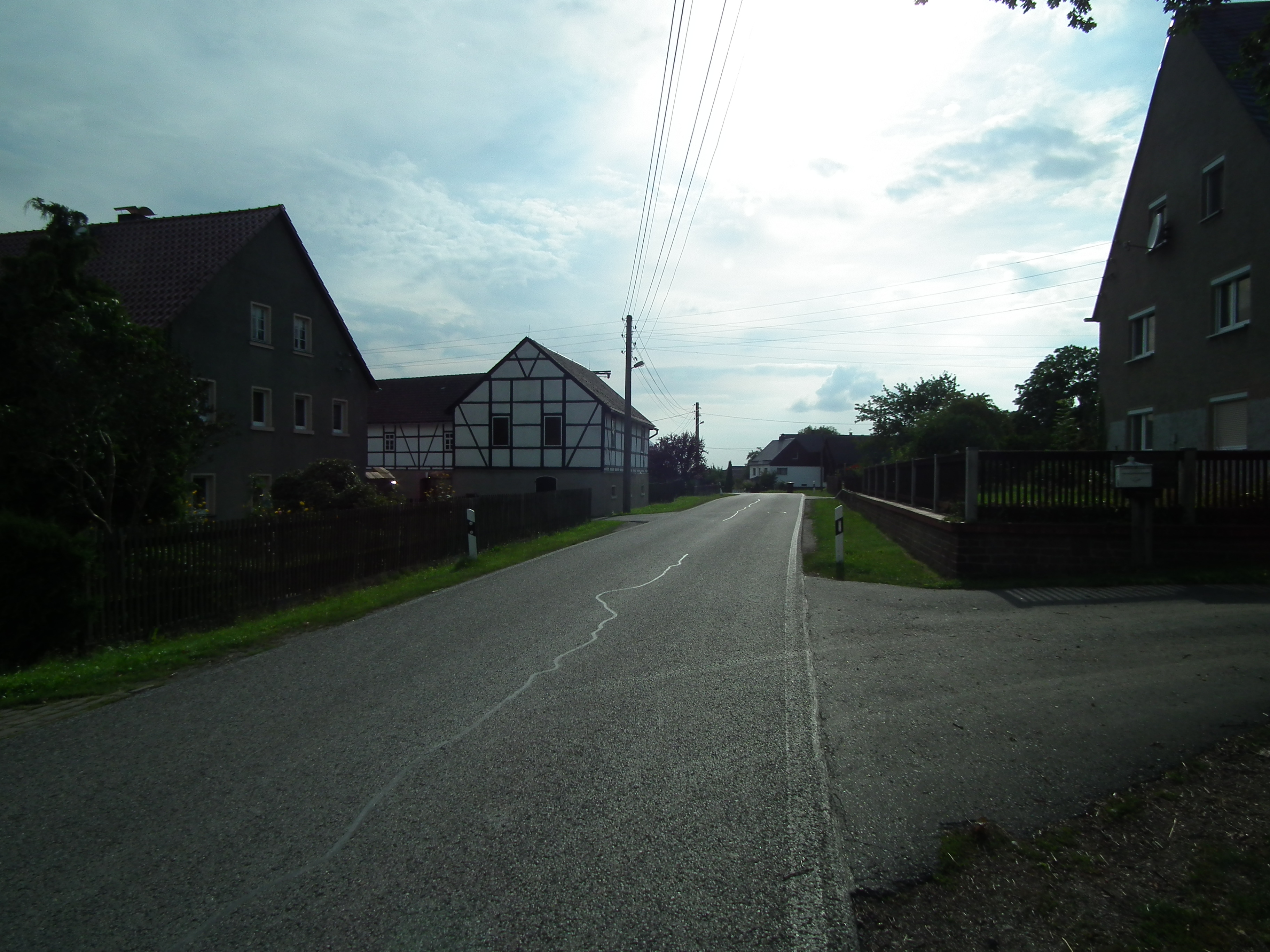 Ortansicht Goßberg